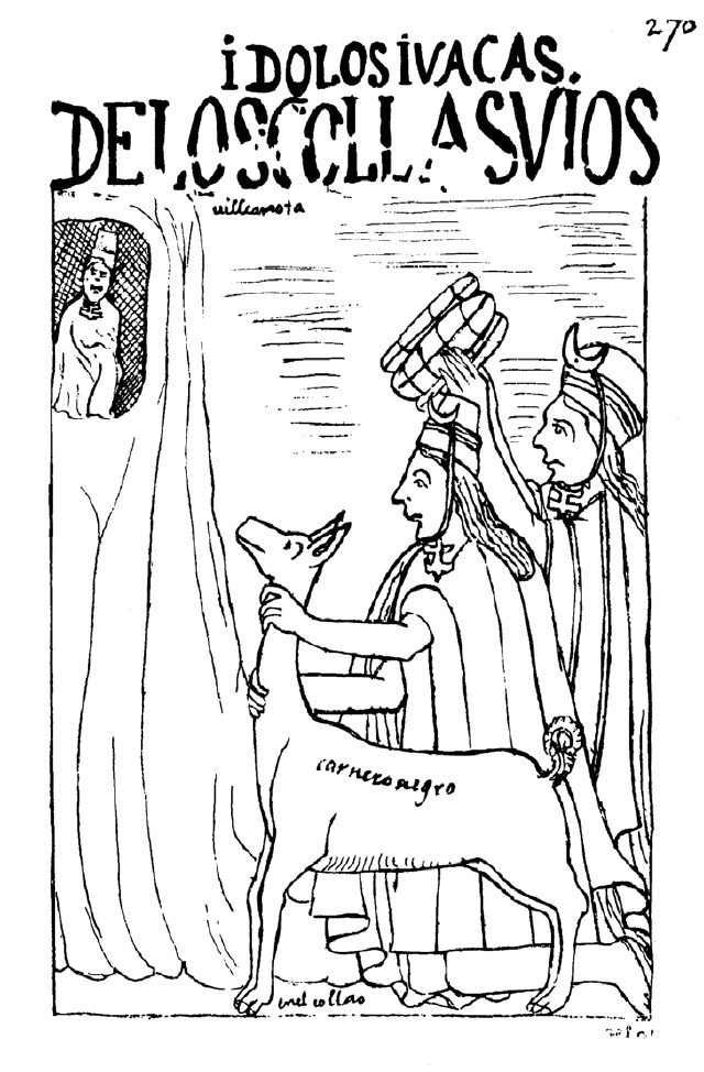 ÍDOLOS I VACAS DE LOS COLLA SVIOS